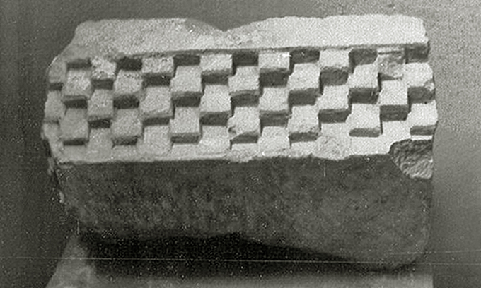 Kämpfer mit romanischem Klötzchenfries aus der Krypta, die beim Einbau einer Luftheizung im Zuge der Renovierung der Bartholomäuskirche laut Landesdenkmalamt (LDA) 1956 zerstört wurde (Quelle: Bildbeschreibung des LDA)